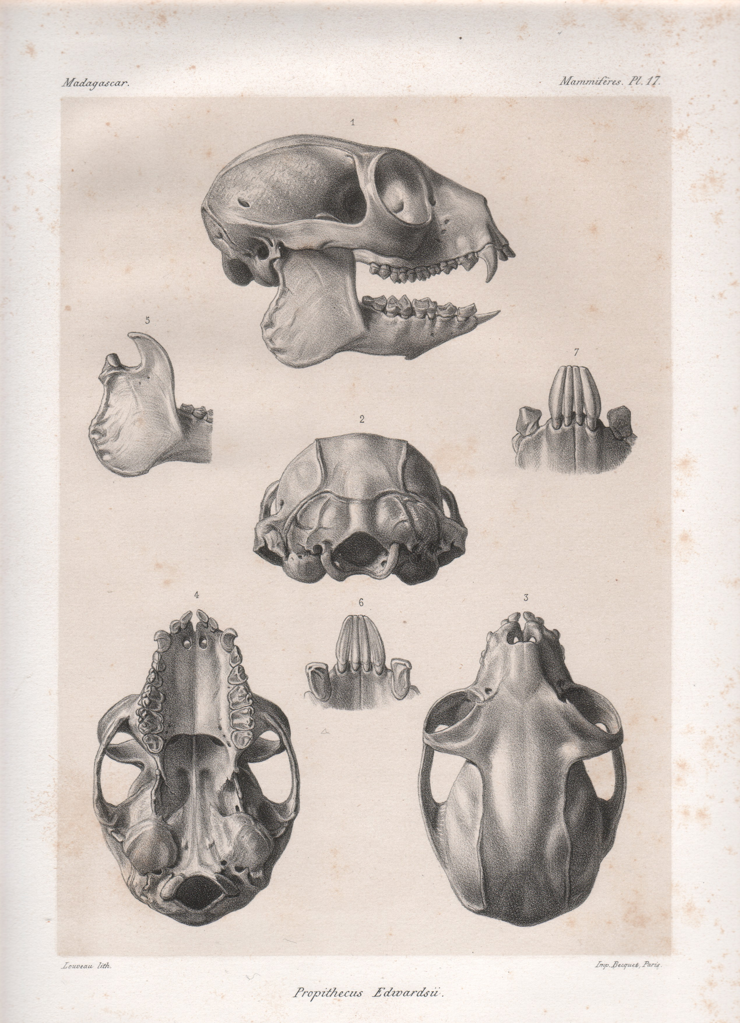 historische Darstellung der Anatomie des Schädels eines Edwards-Sifaka (Propithecus edwardsi)